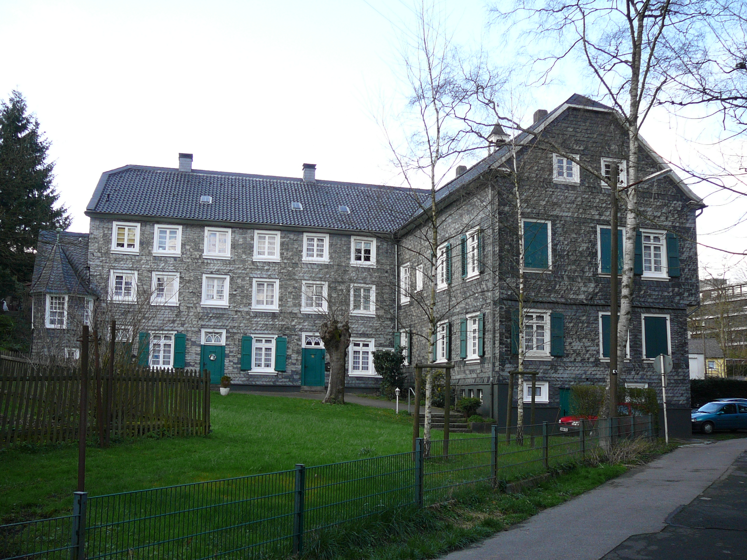 In der Mirke, Wuppertal